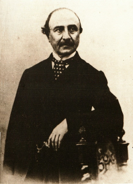 Fotografia di Luigi Carlo Farini mentre era governatore dell'Emilia.